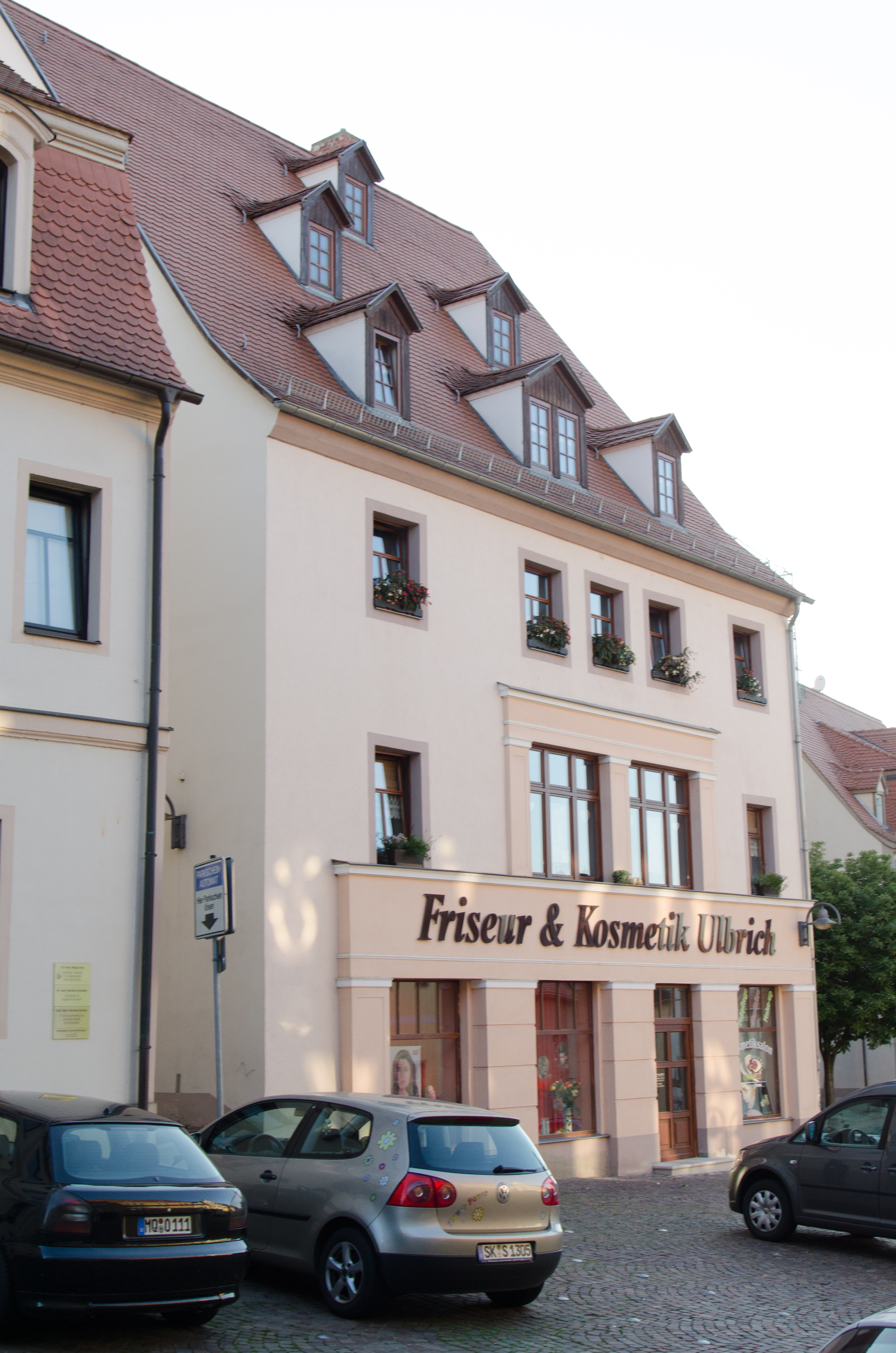 Querfurt, Markt 8